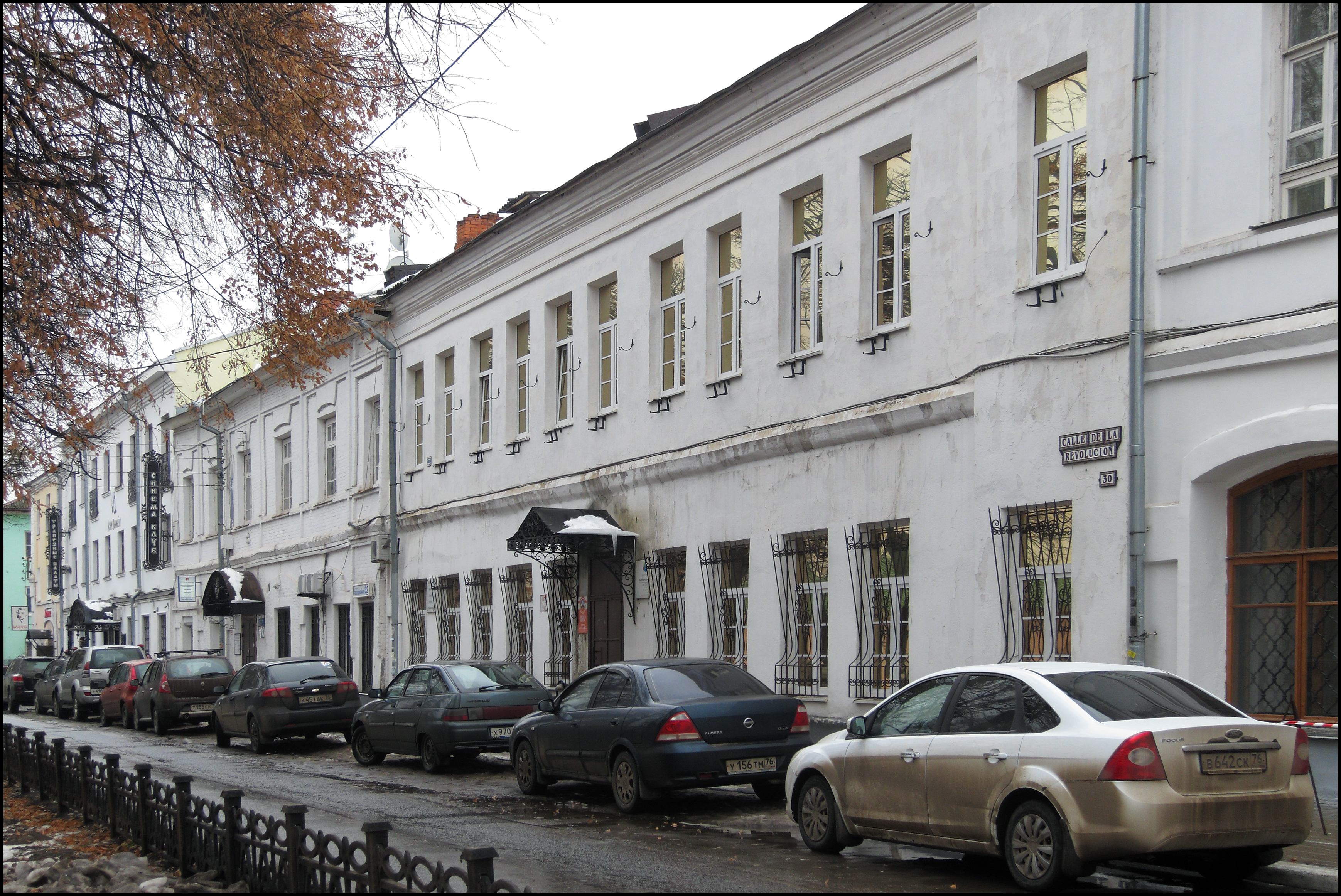 Лавки Оловянишникова (гостиный двор Старый) (Ярославская область, Ярославль, Революционная улица, 30)